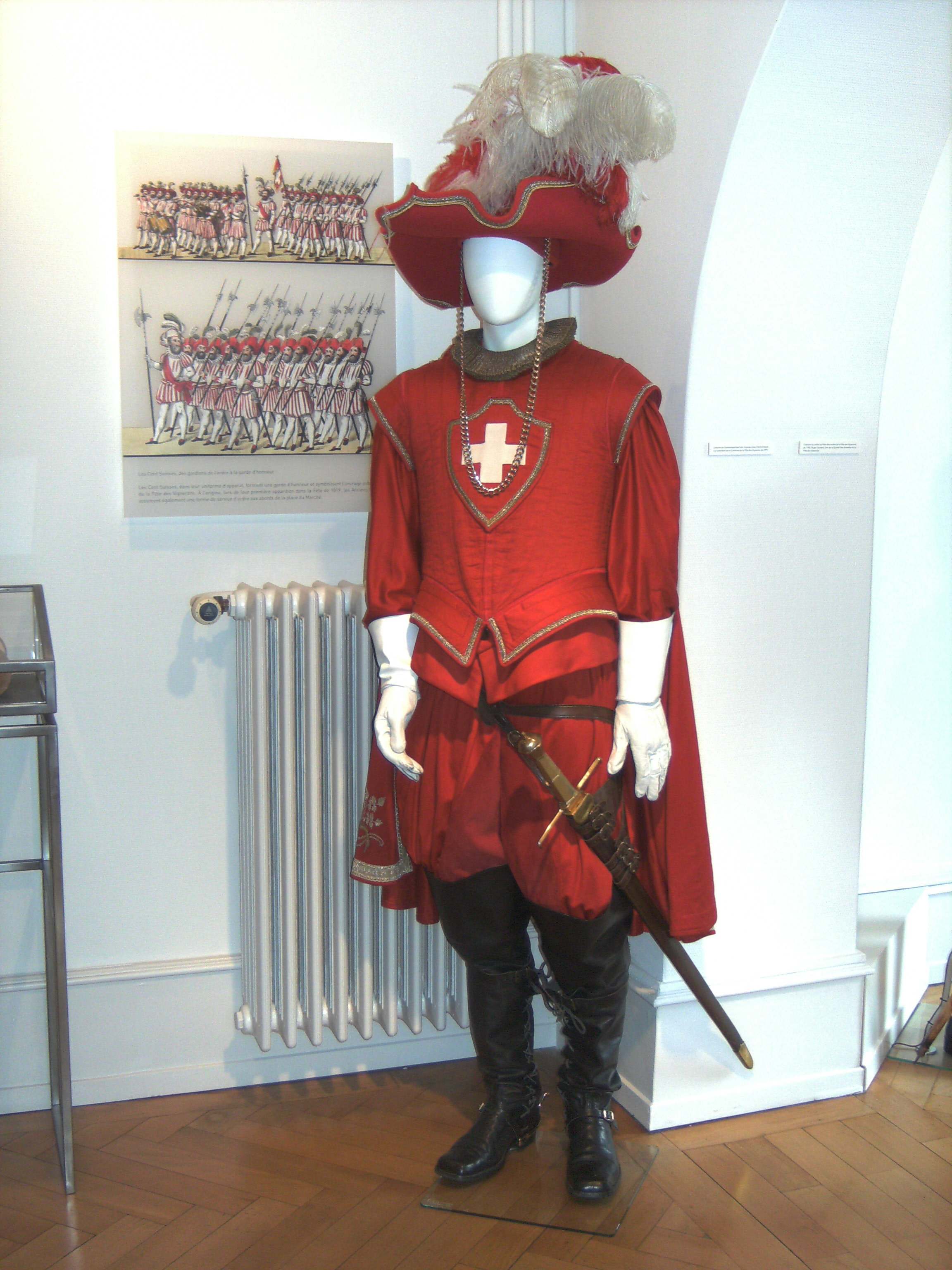 Vevey (Suisse) - musée de la Confrérie des Vignerons - Costume du Commandant des Cent-Suisses de la Fête des vignerons de 1999.